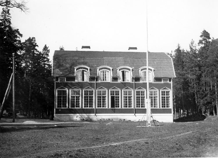 Kallhälls skola (Bolinders skola) vid Dahlerusvägen på 1930-talet. Kallhälls äldsta skola. Öppnad 1909, nedlagd 1952. Järfälla kommuns bilddatabas, bild nr 02342.